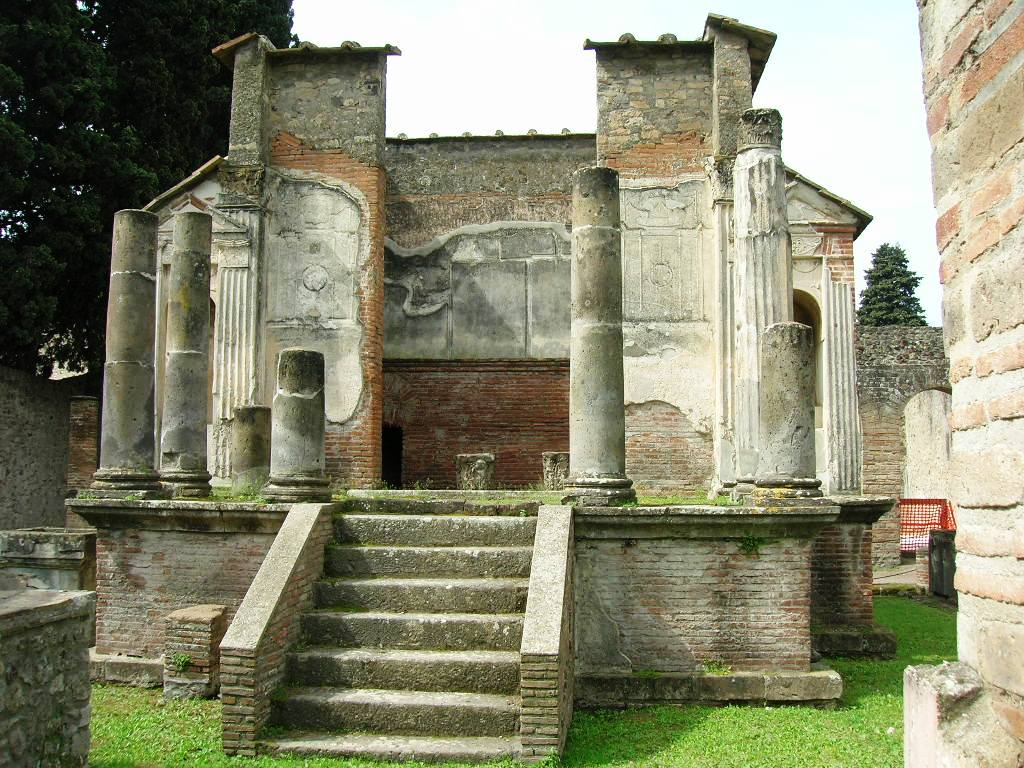 Il tempio di Iside a Pompei